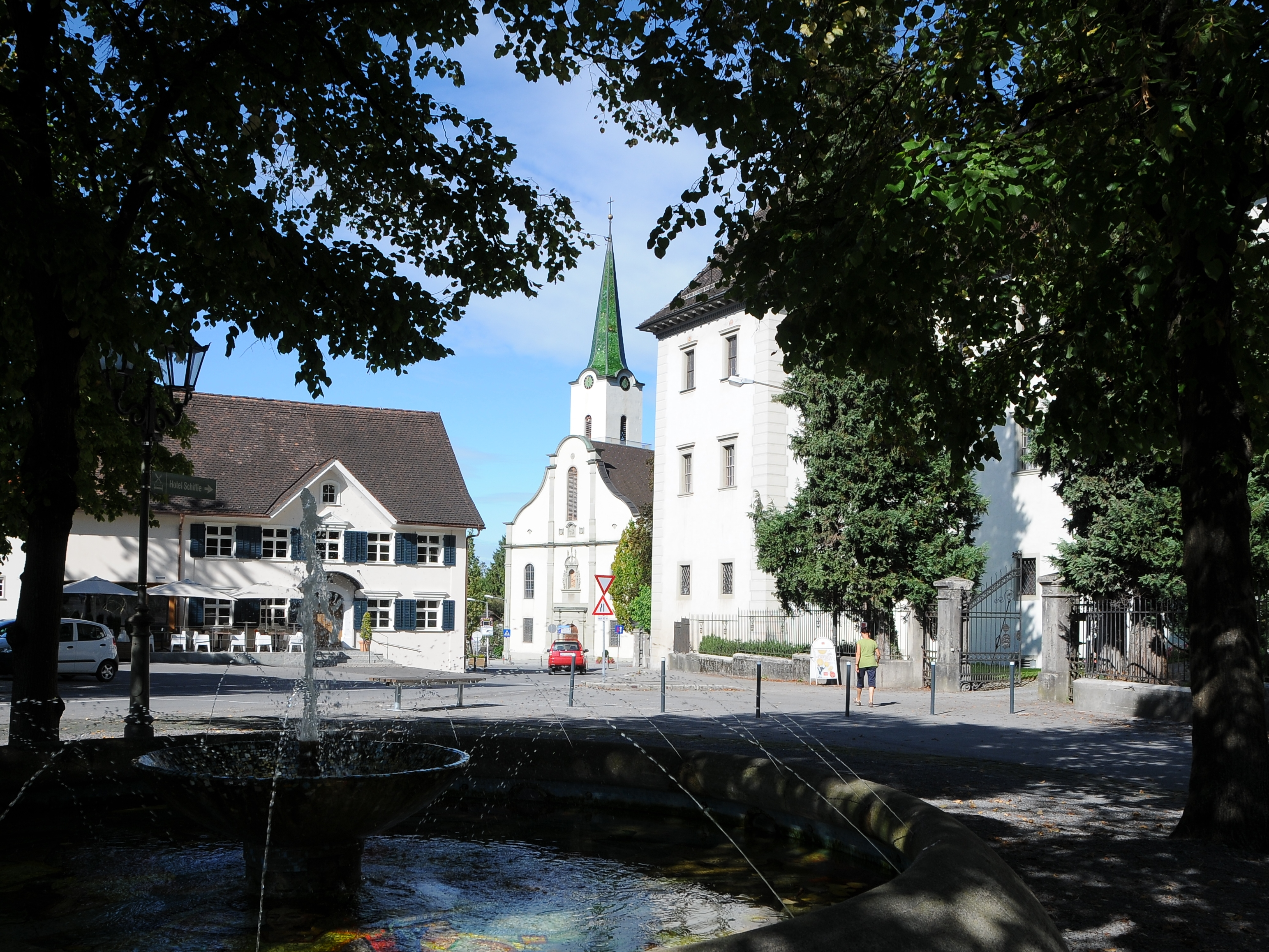 Im Zentrum von Hohenems. Links der Gasthof Löwen, mitte die Stadtpfarrkirche St.Karl, erbaut 1797 und rechts der Palast.